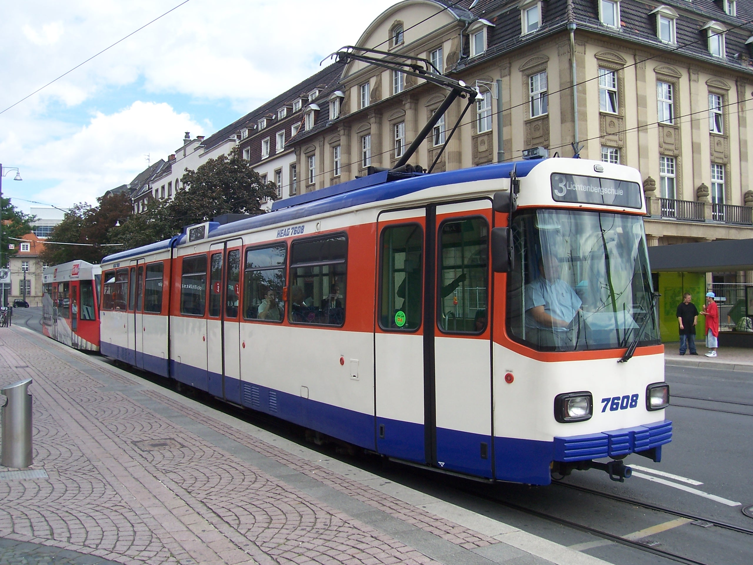 Straßenbahn 7608 der HEAG mobilio in Darmstadt am Hauptbahnhof